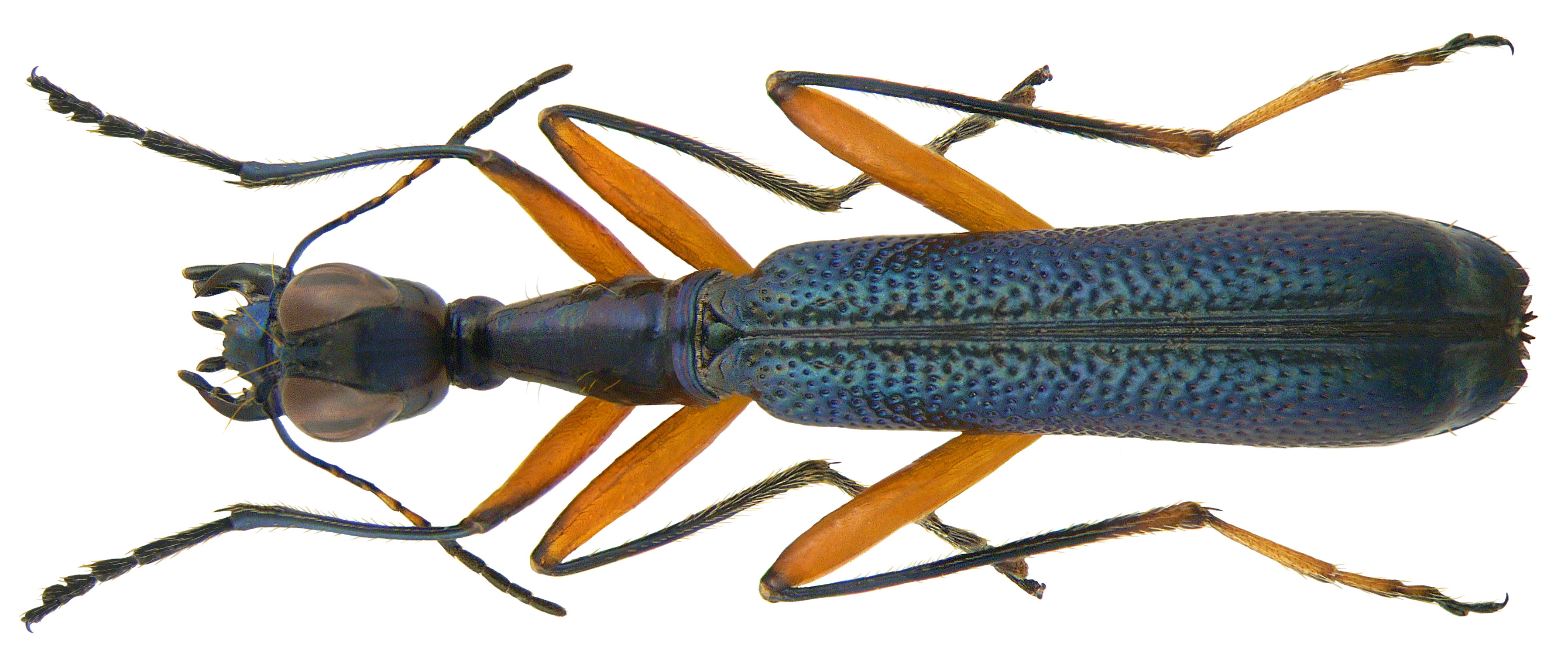 Familie: Carabidae Groesse: 12,5 mm Fundort: Indonesien, Sulawesi, Boroko leg. A.Skale, 2009; det. J.Wiesner, 2009 Foto: U.Schmidt, 2009